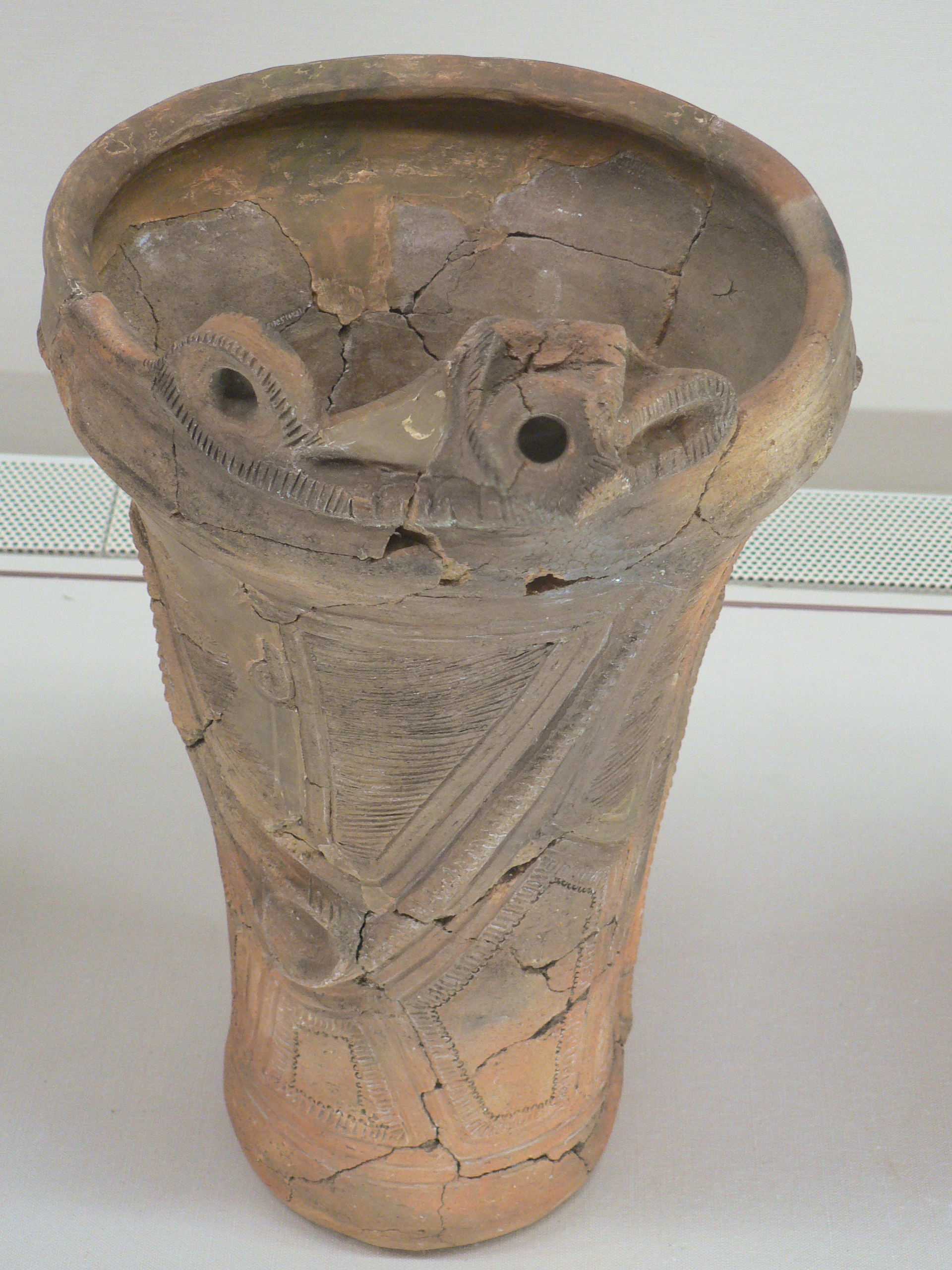 尖石遺跡から出土した縄文時代の深鉢